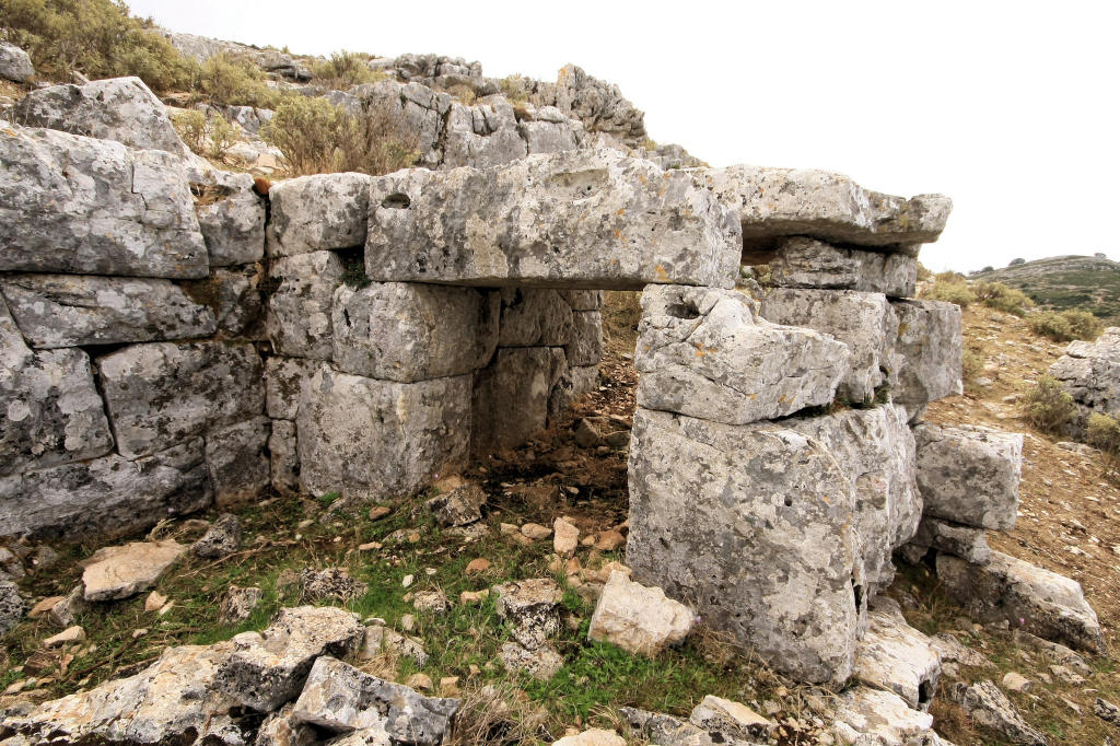 Καστρί Αλυζίας, η πύλη στο ΒΔ τμήμα της οχύρωσης.